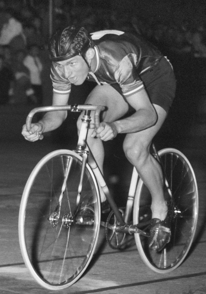 Wereldkampioenschap wielrennen op de baan in Amsterdam Trepp (Zw.) tijdens achtervolging amateurs